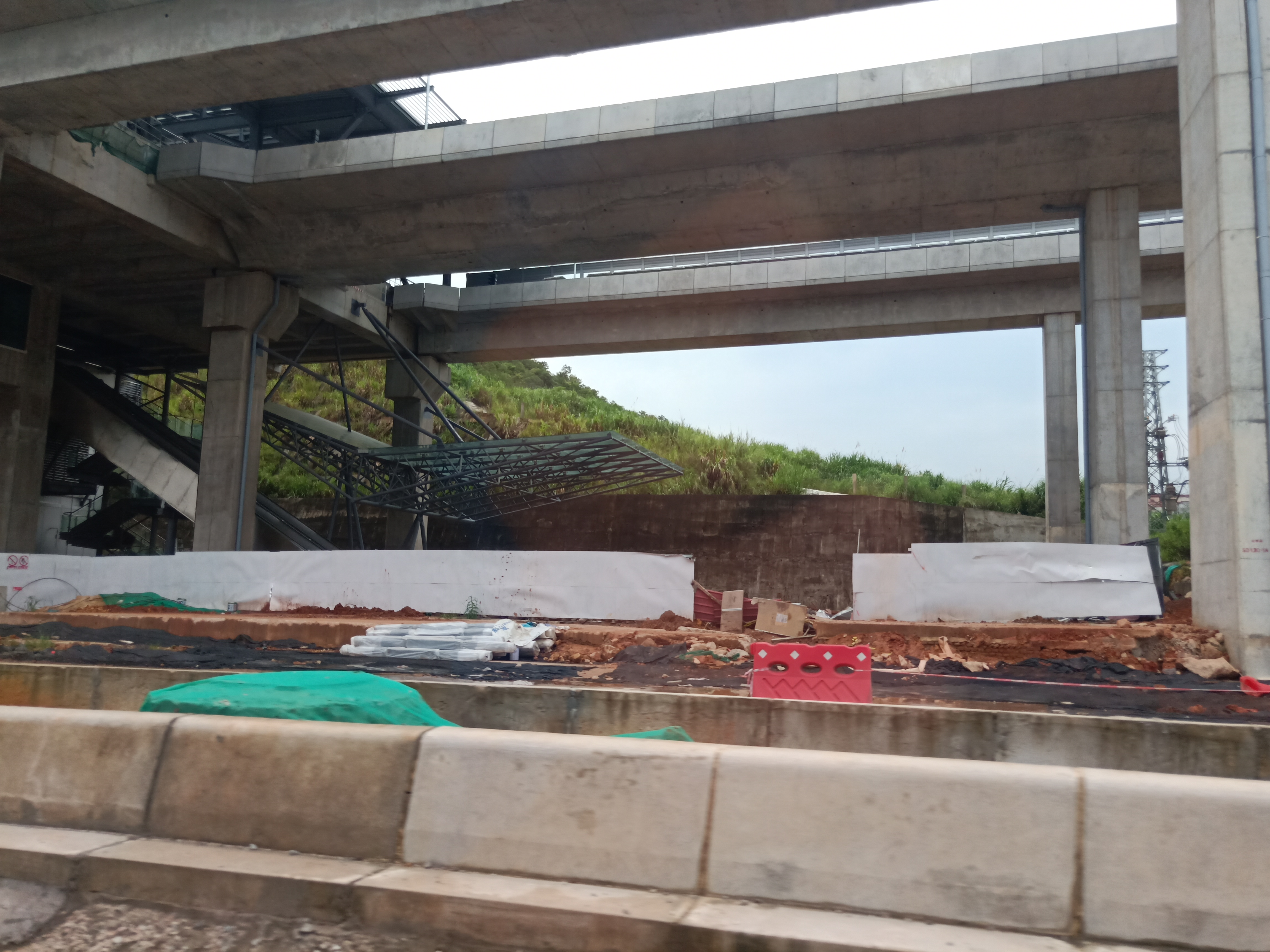 粵語: 2018年8月31號，赤草站重喺度起緊。